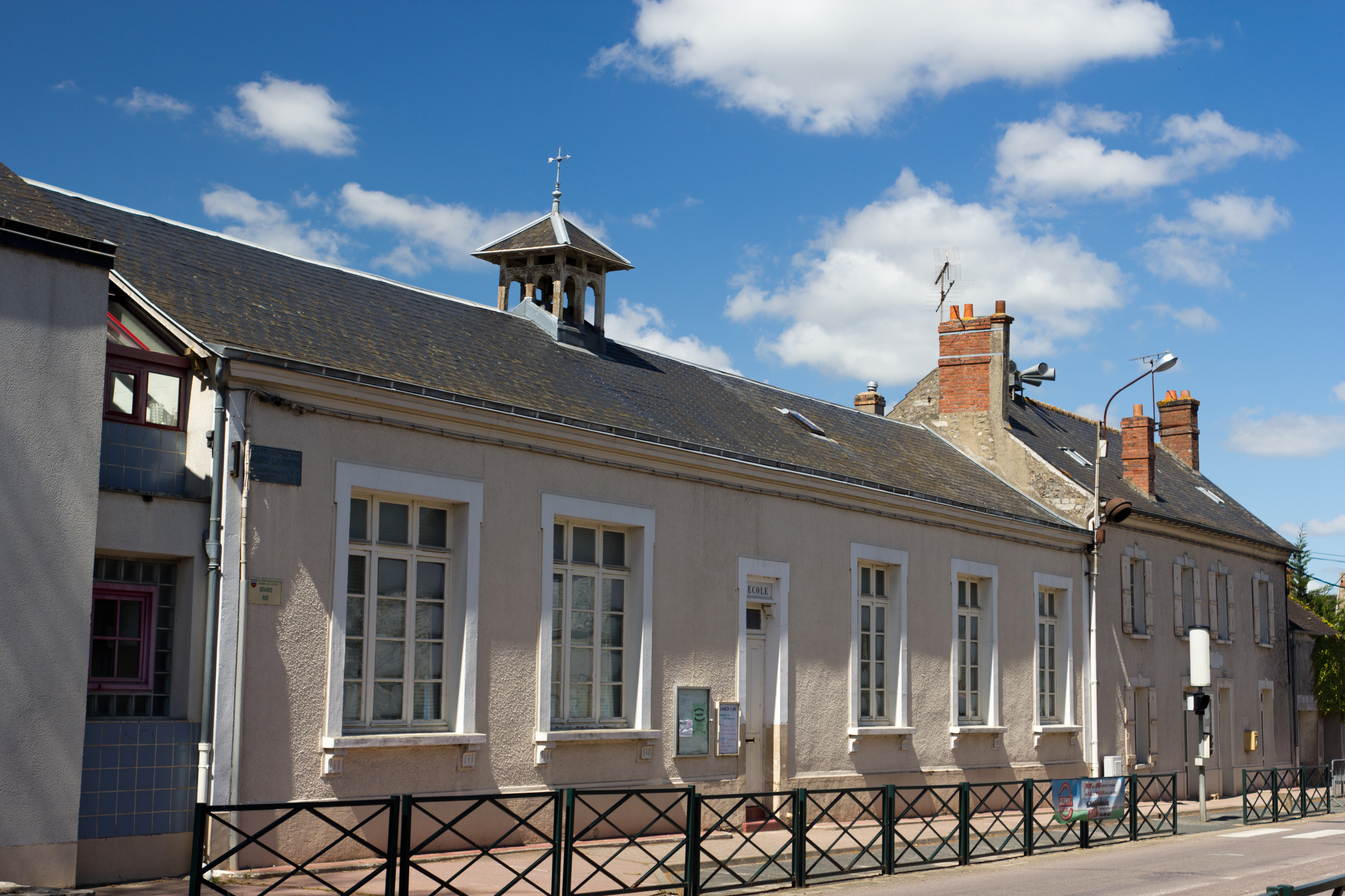 Ecole primaire de Boissy-le-Cutté, Boissy-le-Cutté, département de l'Essonne, France.